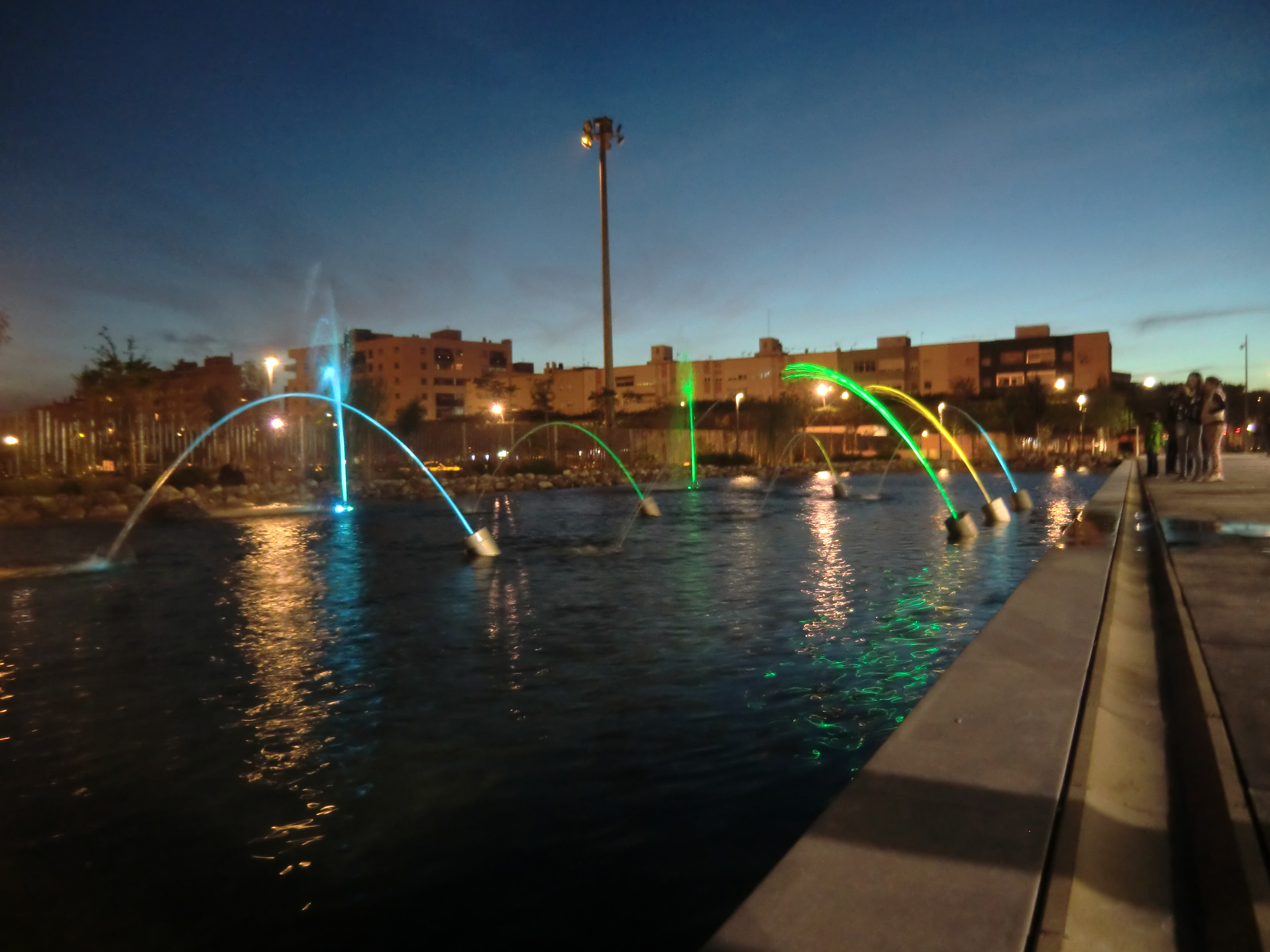 Juego de colores en la fuente grande del Parque de las Familias